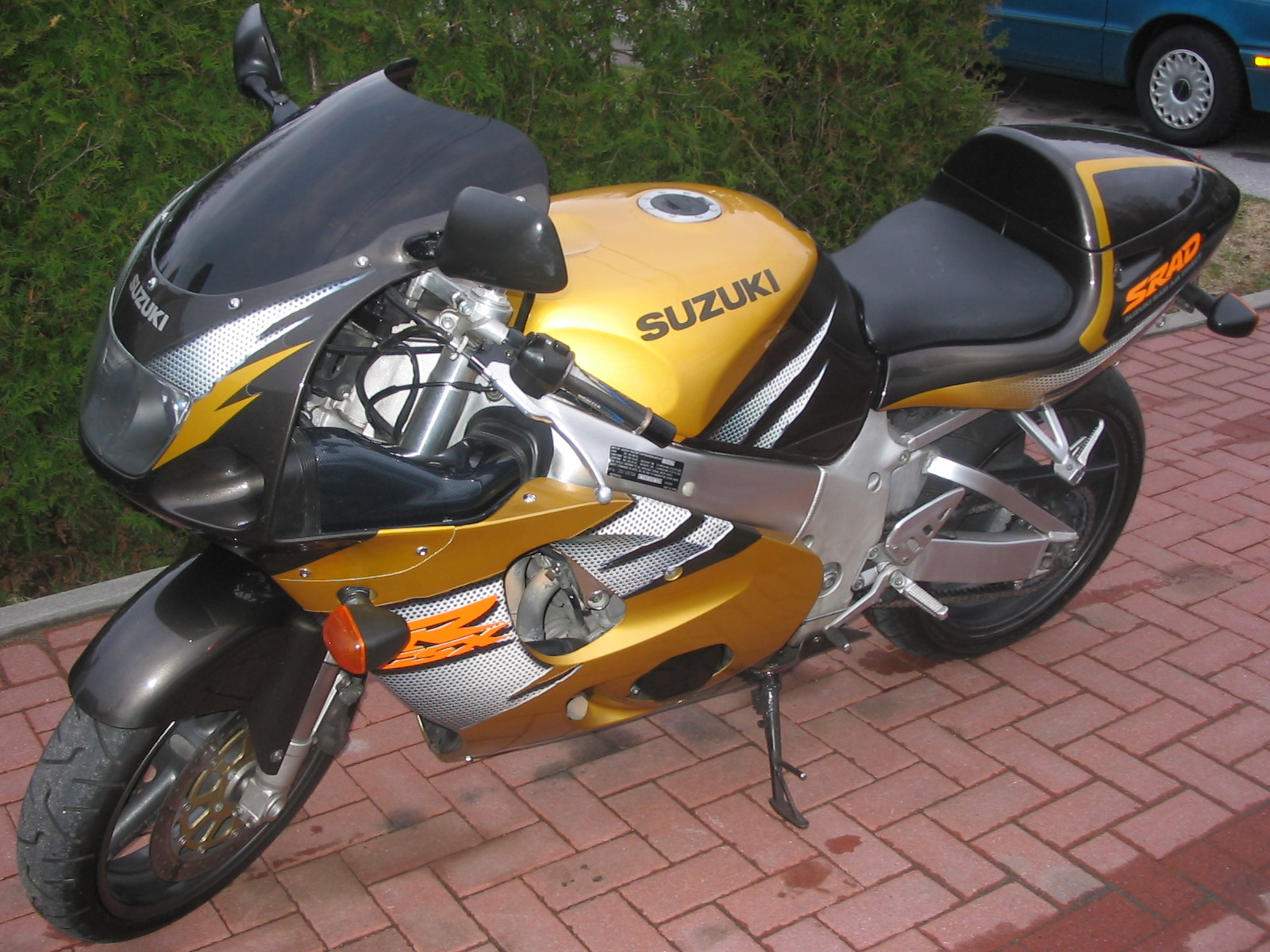 Suzuki GSX-R750 1996 Black / Gold Canada Québec Nicolas Doré